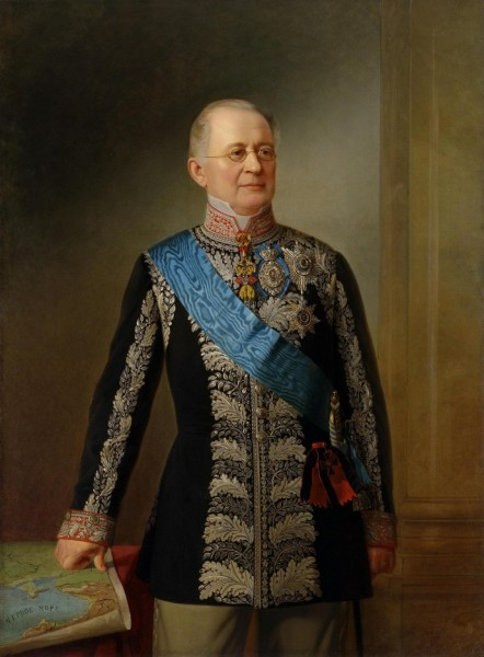 Porträt von Alexander Mihailowitsch Gortschakow gemalt von Georg von Bothmann